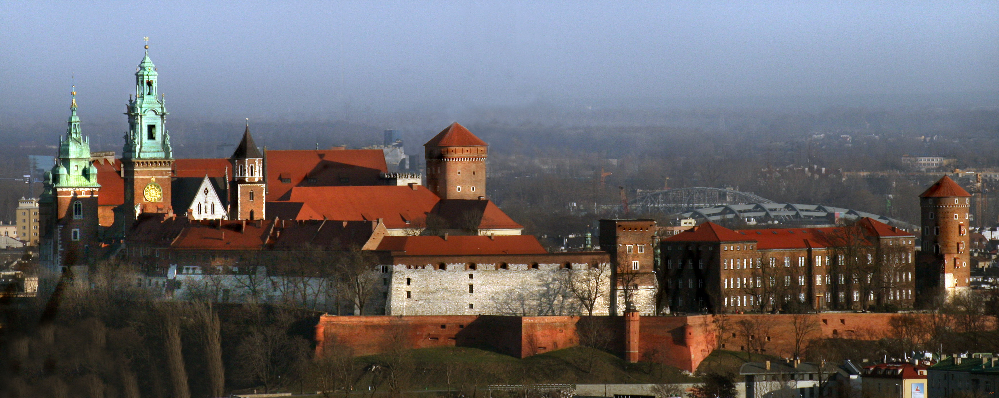 Wzgórze Wawelskie widziane z kopca Kościuszki